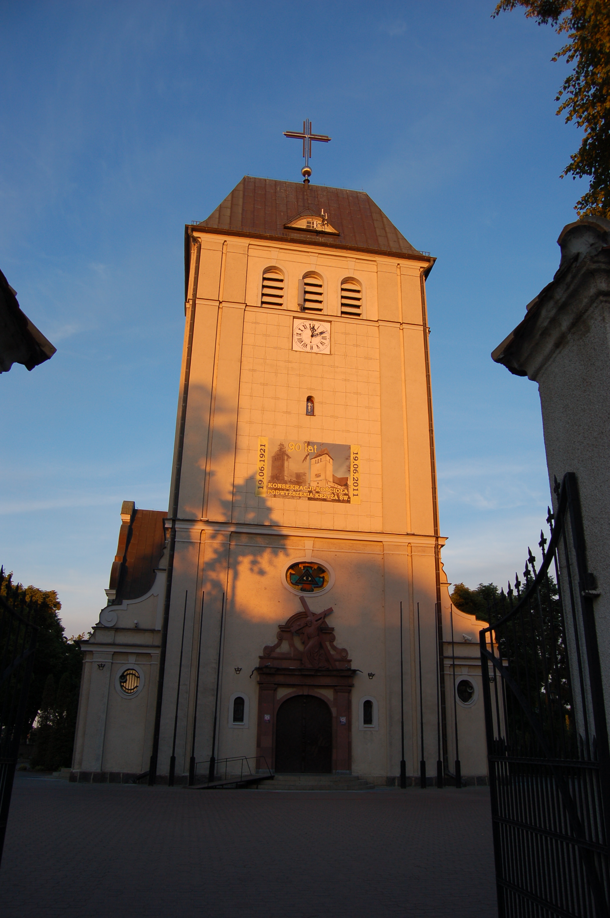 Zdjęcie przedstawia kościół Podwyższenia Krzyża Świętego w Rumi